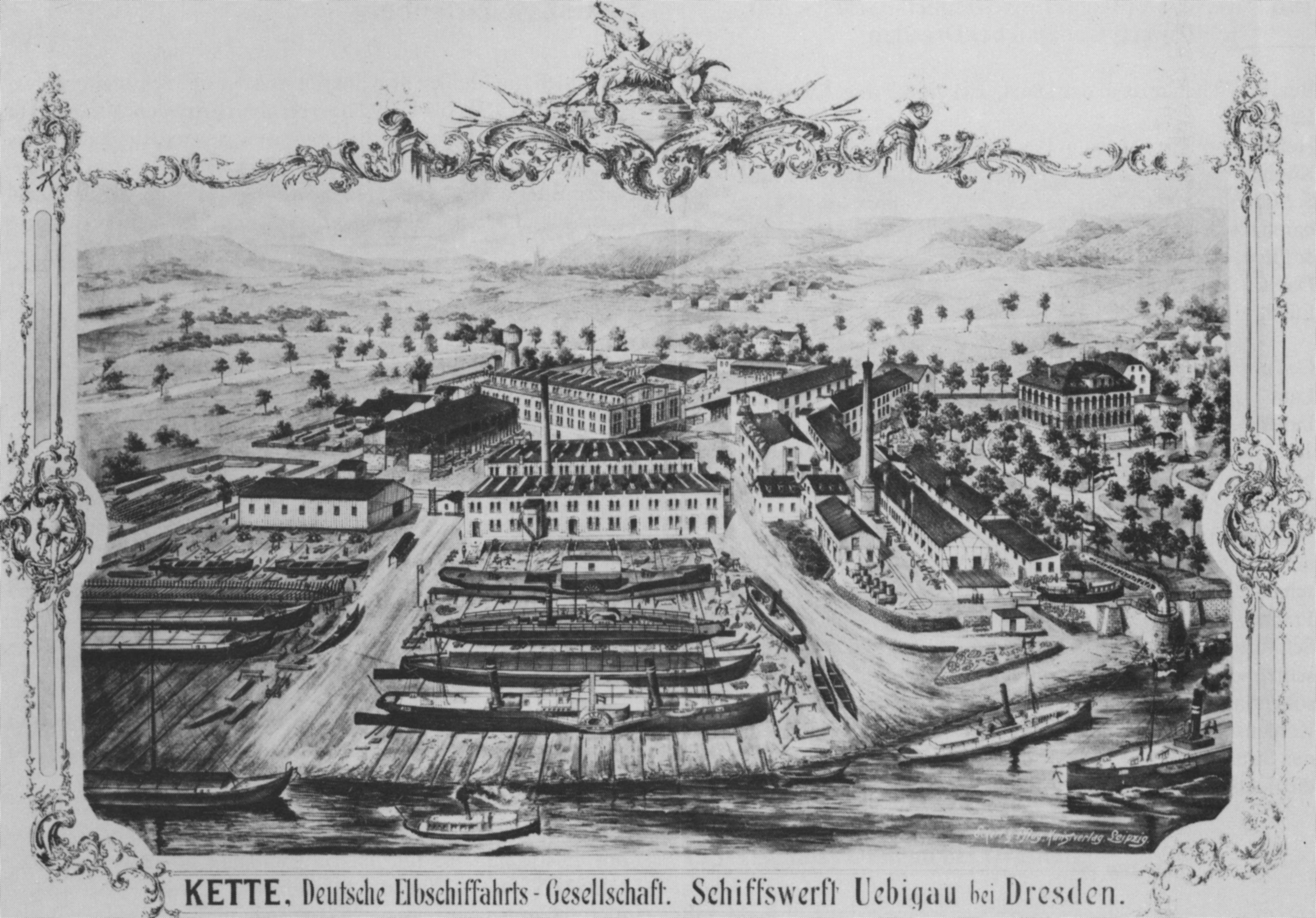 Elbschiffahrtsgesellschaft Kette Schiffswerft Übigau